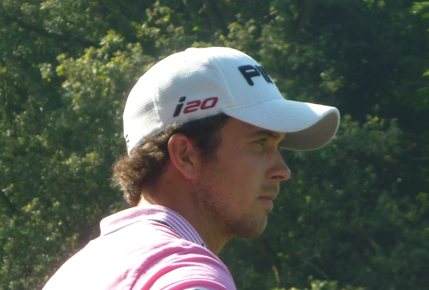 Knut Børsheim